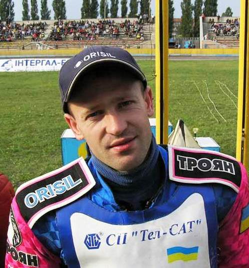 5-кратний чемпіон України серед юніорів (1994-1998)